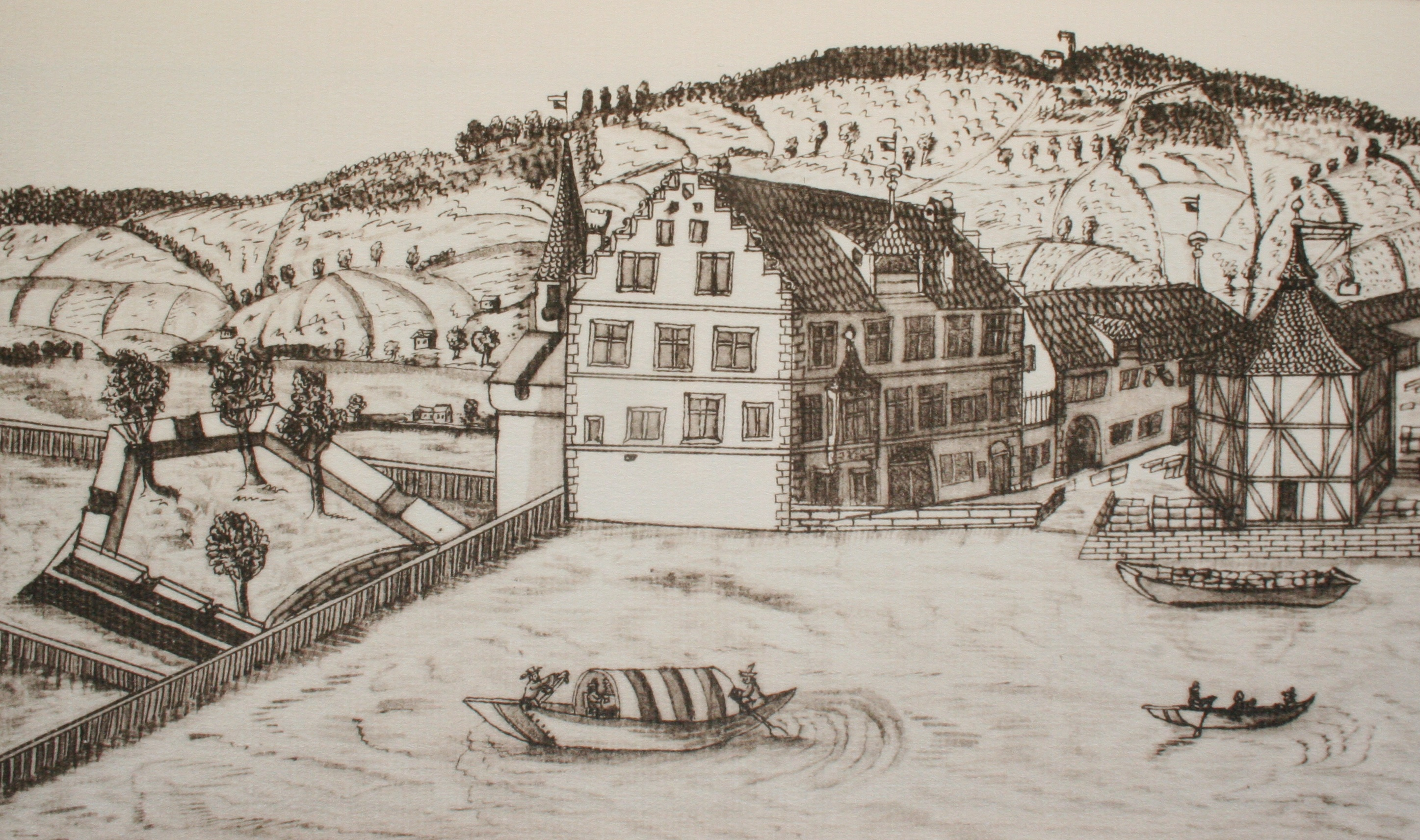 Zürich : Das Bauhaus im Kratzquartier um 1700. Am lnken Bildrand ist das Bauschänzli zu erkennen. Federzeichnung von Gerold Escher.